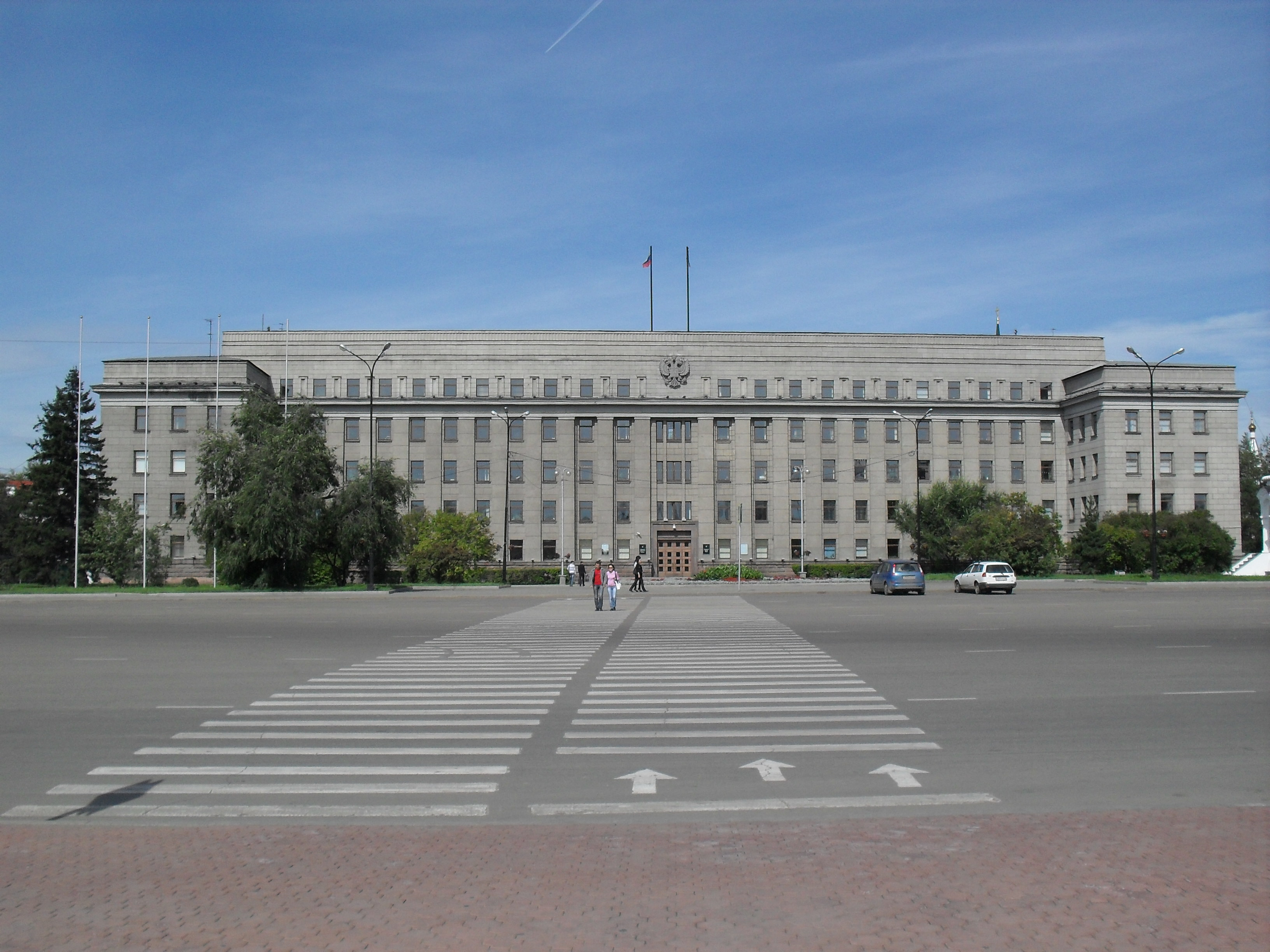 Иркутск. Здание правительства Иркутской области. "Серый дом". 1938-1957.